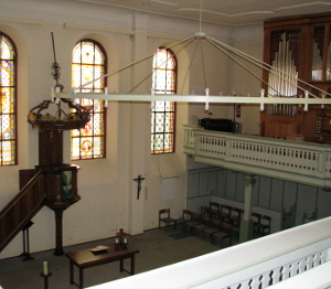 Evangelische Stadtkirche in Weinheim.